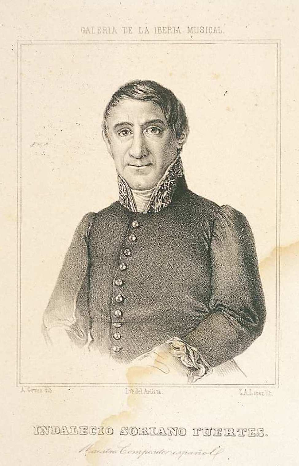 Retrato de Indalecio Soriano Fuentes, litografía de Juan Antonio López por dibujo de Antonio Gómez Cros. Ilustración de la Galería de la Iberia Musical.